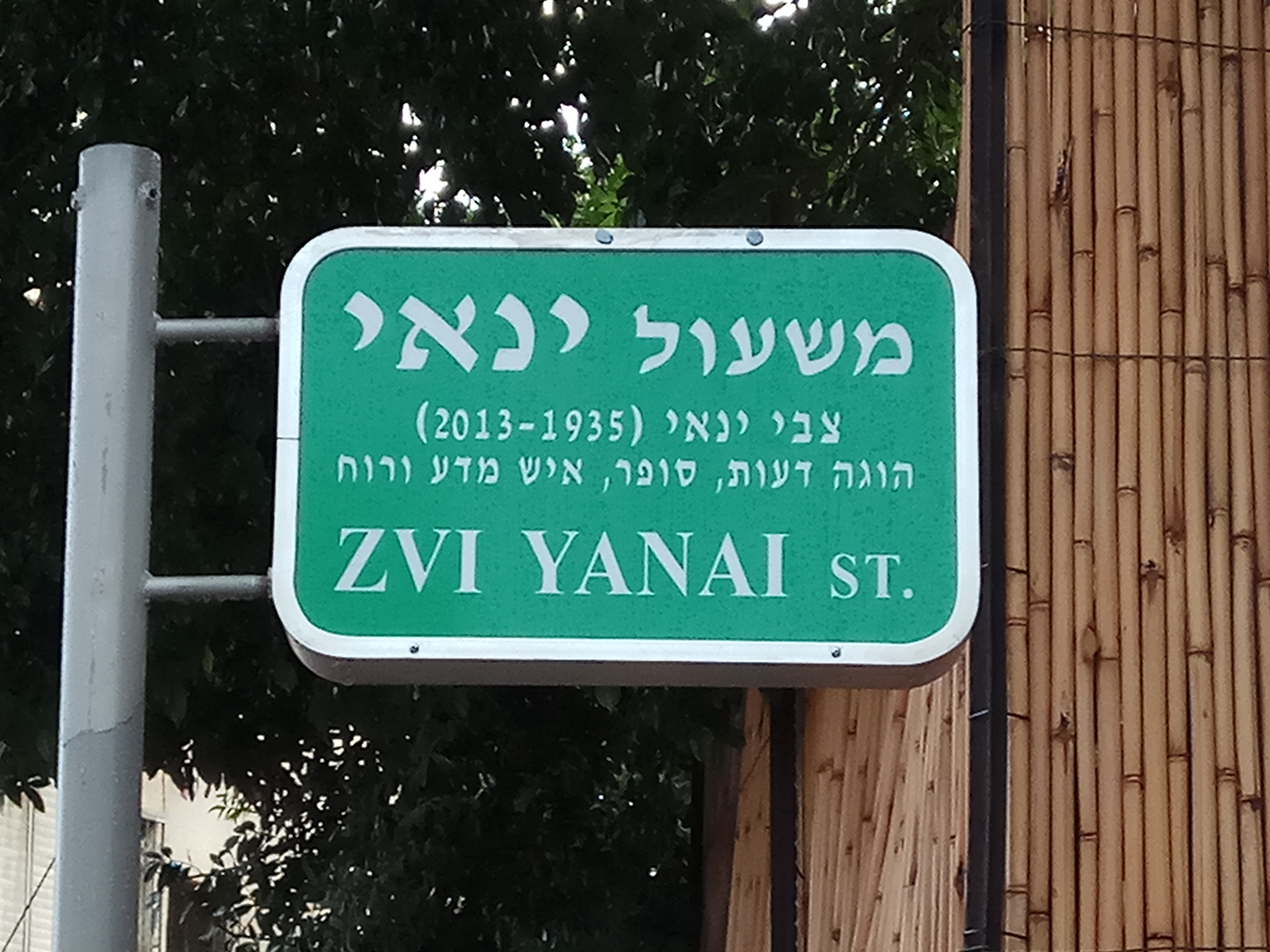 משעול ינאי ברמת גן